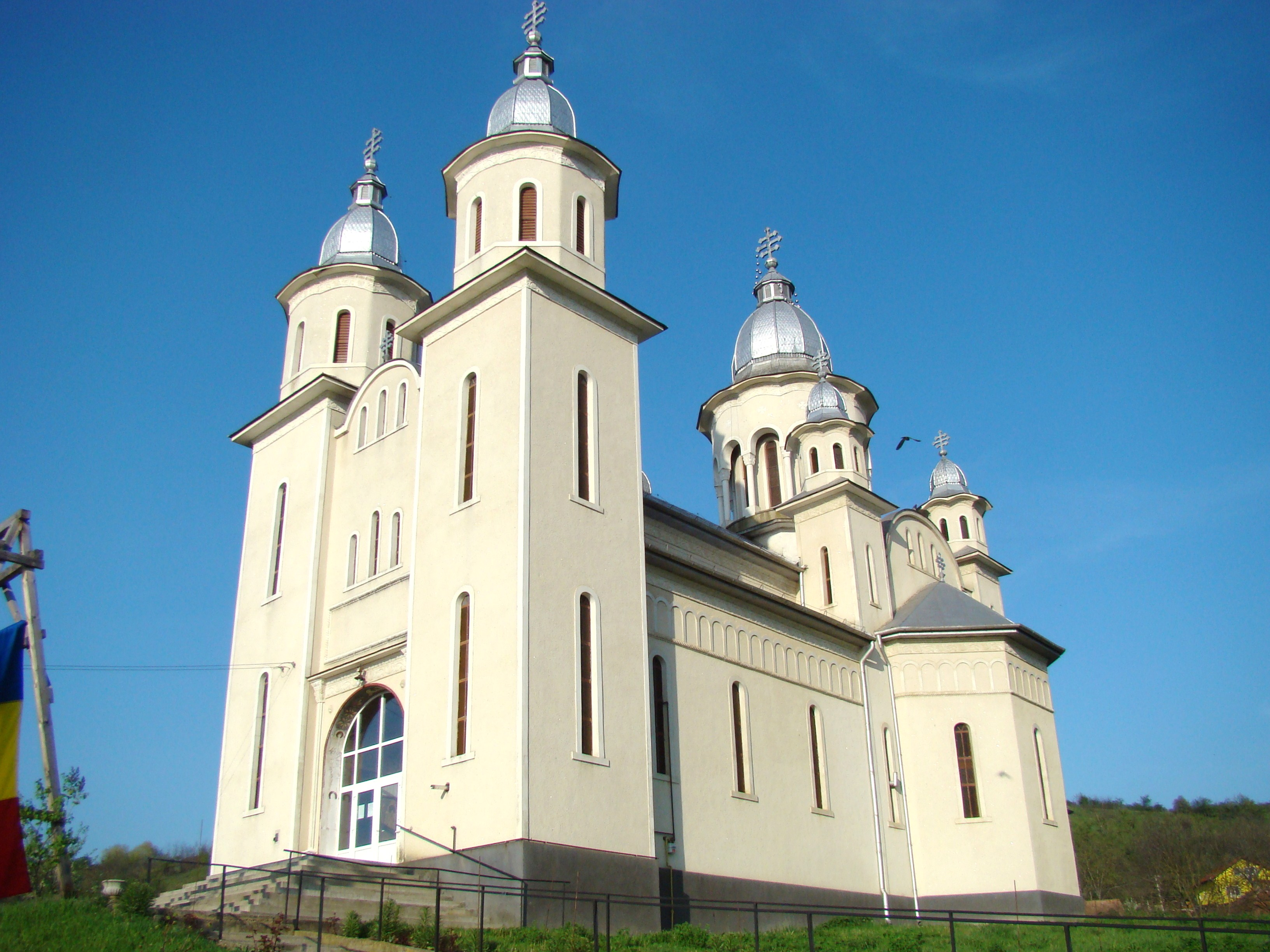 Biserica ortodoxă „Sfântul Apostol și Evanghelist Matei” din Tritenii de Jos, județul Cluj